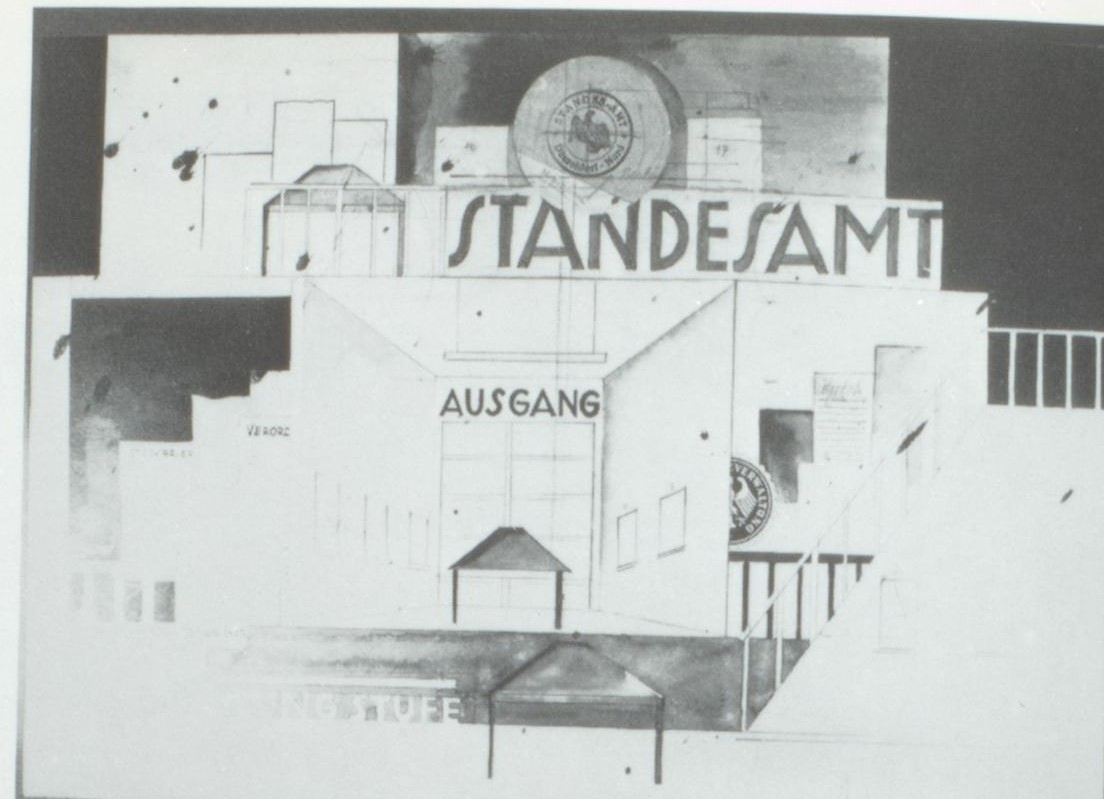 Traugott Müller Paul Hindemith Neues vom Tage Entwurf 1929